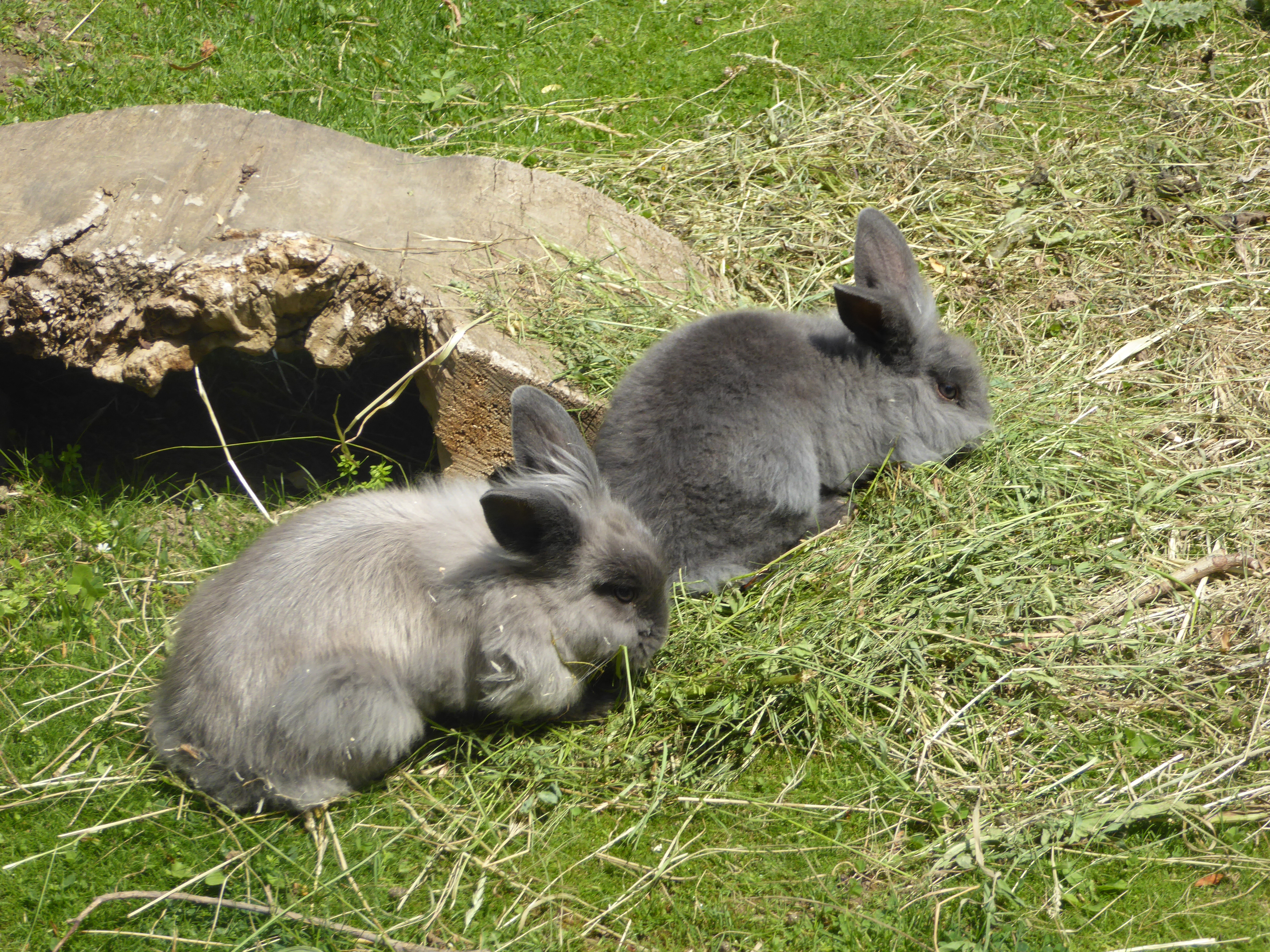 Tiergarten Schönbrunn